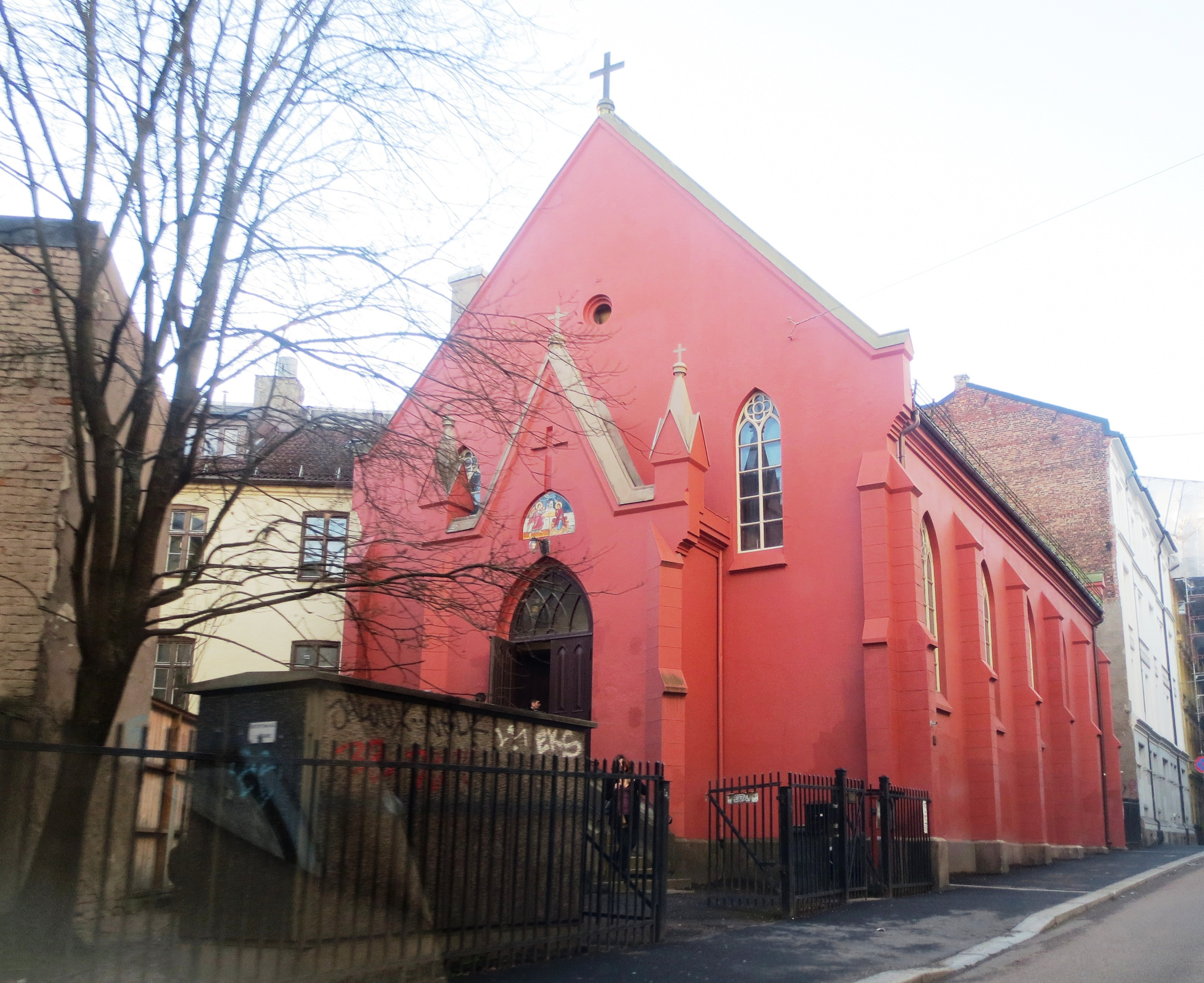 Den Apostoliske kirke i Oslo.